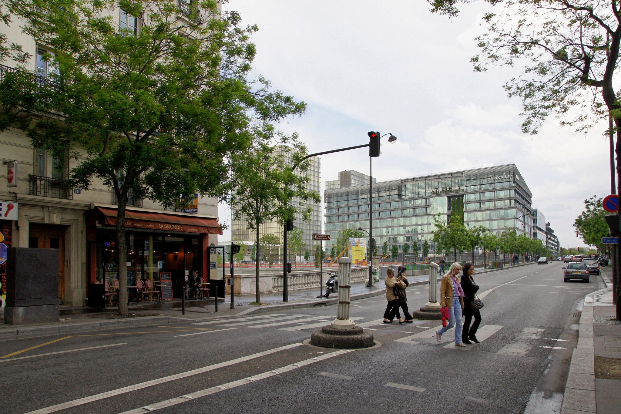 Rue de Tolbiac, Paris, France.